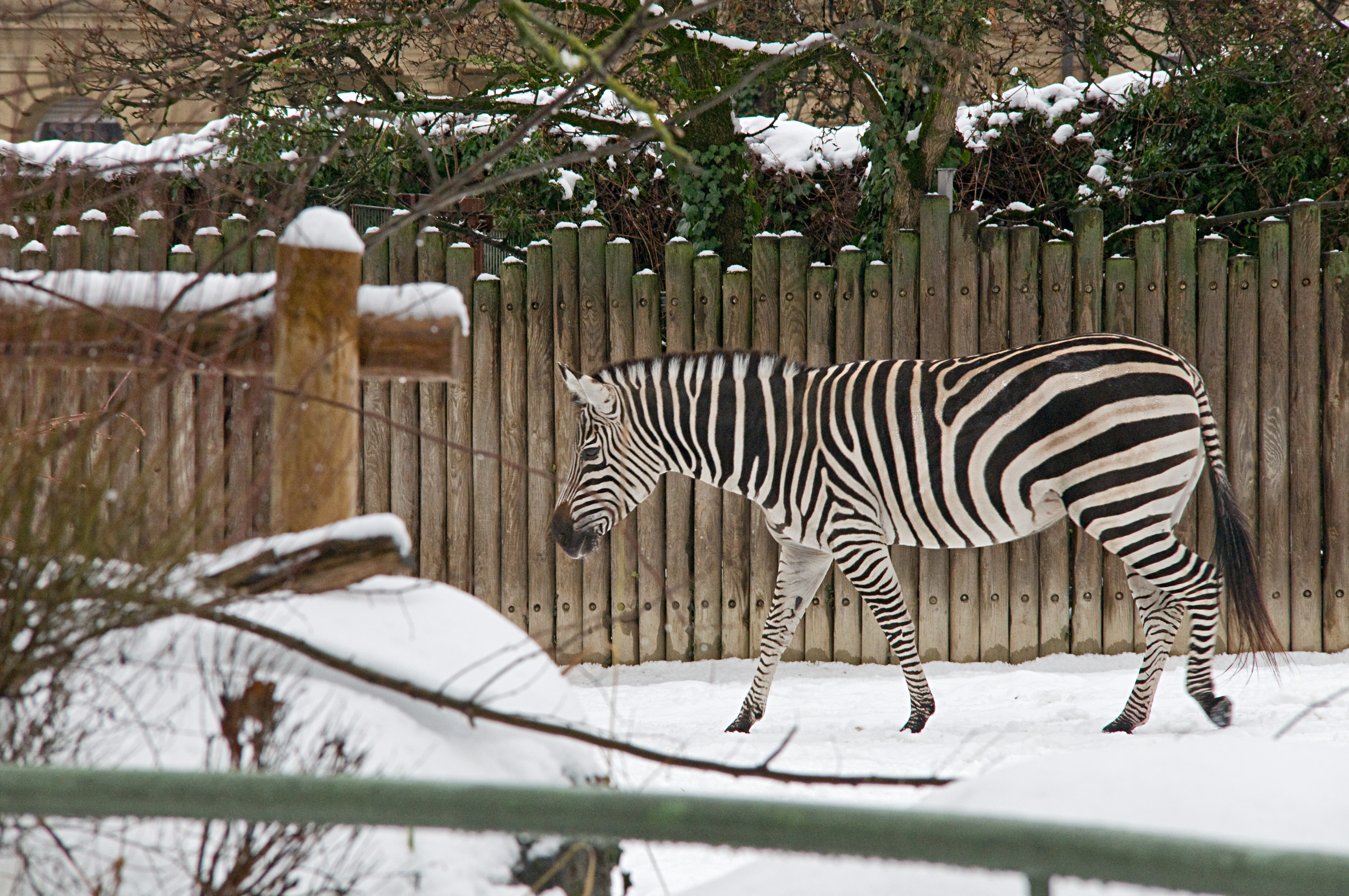 Zoo Karlsruhe: Zebra im Schnee